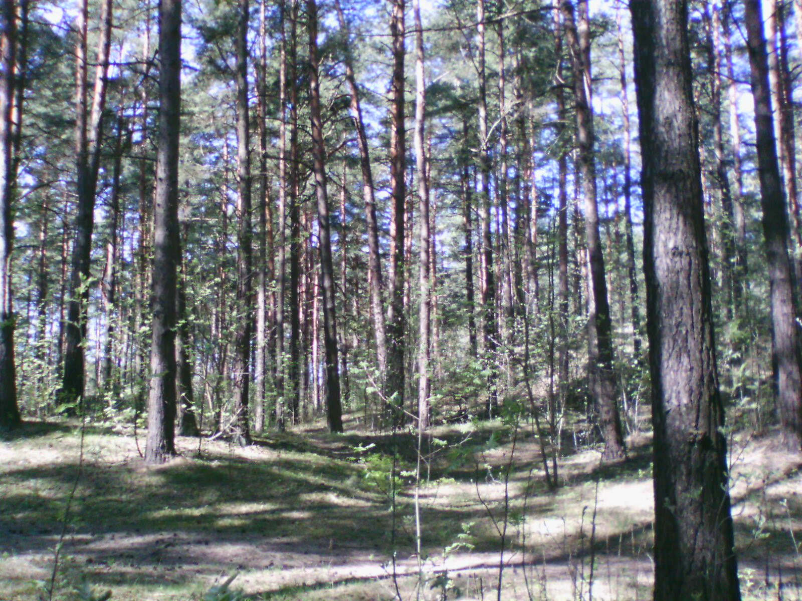 Сосновый лес у границы Риги (Латвия). Снято 27.04.2014